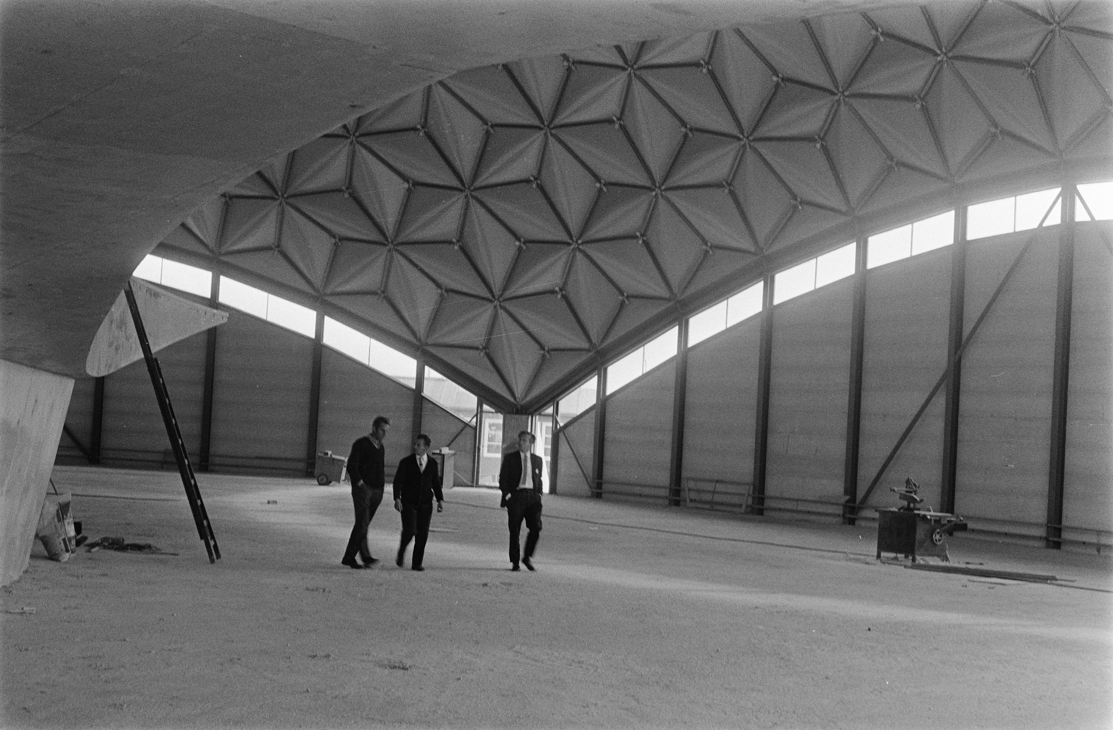 Collectie / Archief : Fotocollectie Anefo Reportage / Serie : [ onbekend ] Beschrijving : Aviodome, Schiphol exterieur Datum : 1 oktober 1969 Locatie : Noord-Holland, Schiphol Trefwoorden : exterieur Persoonsnaam : AVIODOME Fotograaf : Verhoeff, Bert / Anefo Auteursrechthebbende : Nationaal Archief Materiaalsoort : Negatief (zwart/wit) Nummer archiefinventaris : bekijk toegang 2.24.01.05 Bestanddeelnummer : 922-8354